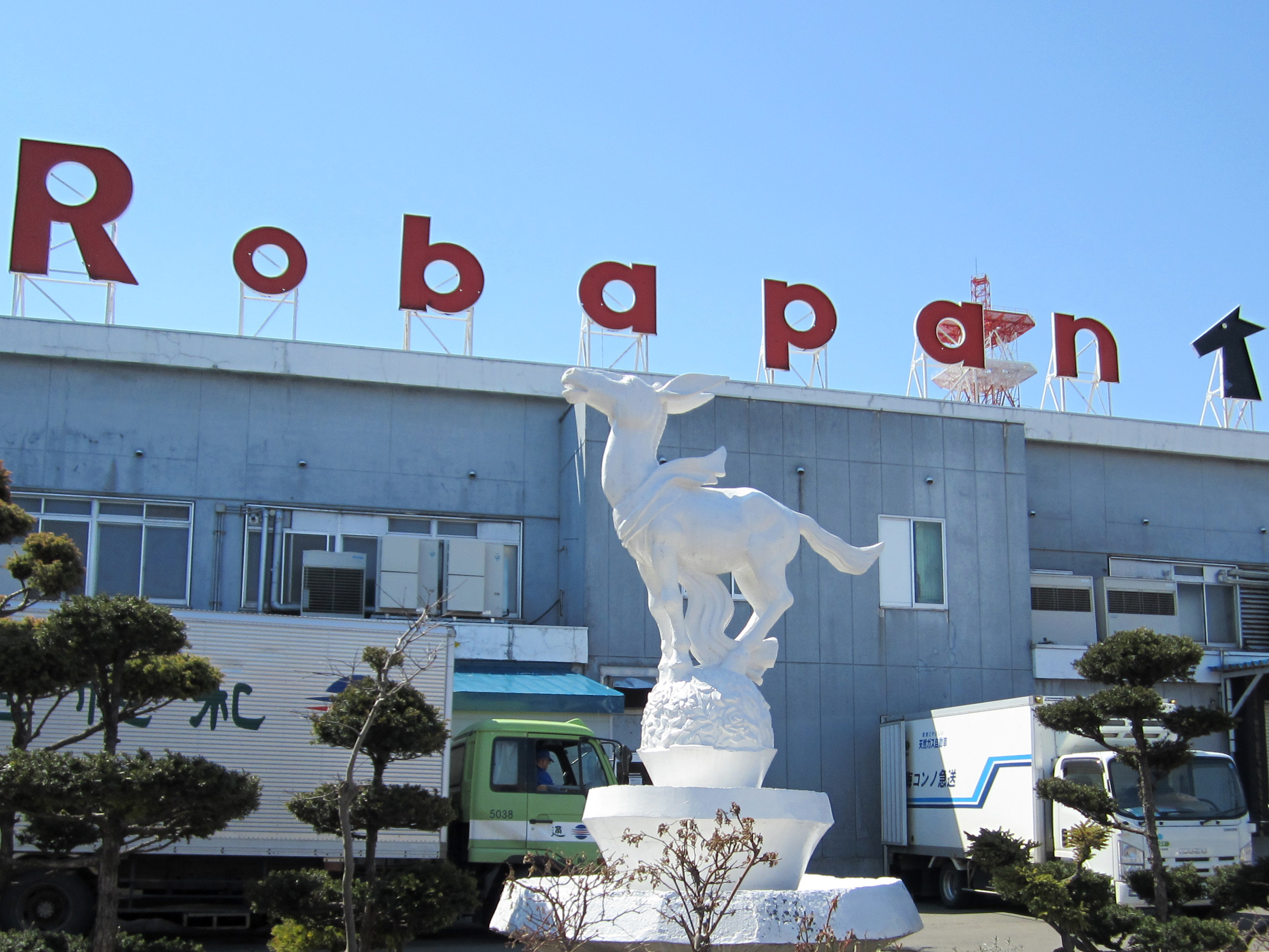 ロバパン本社（北海道札幌市白石区）